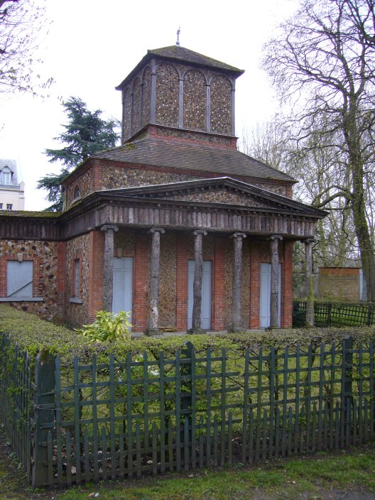 Ancienne Laiterie de Madame, 2 rue Vauban Versailles, France.